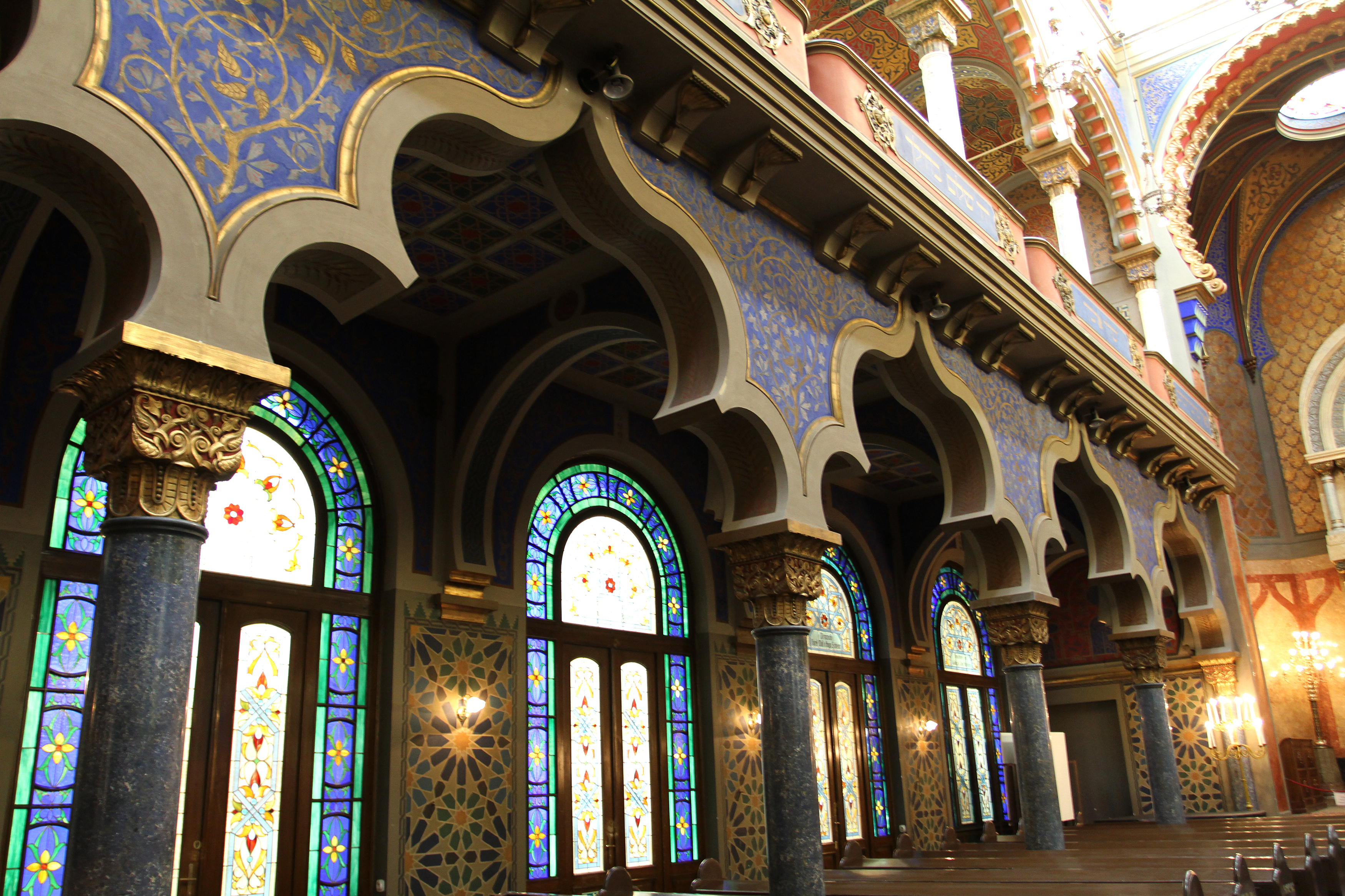 Synagoga Jubilejní (Nové Město), Praha 1, Jeruzalémská 1310/7, Nové Město